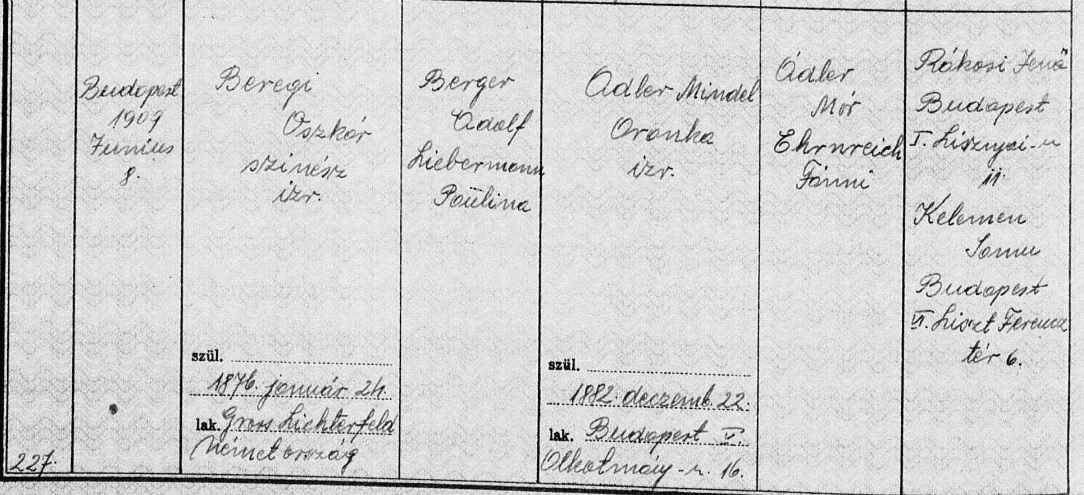 Beregi Oszkár (1876-1965) színész és Ádler Aranka (1882-1929) esküvője (1909)